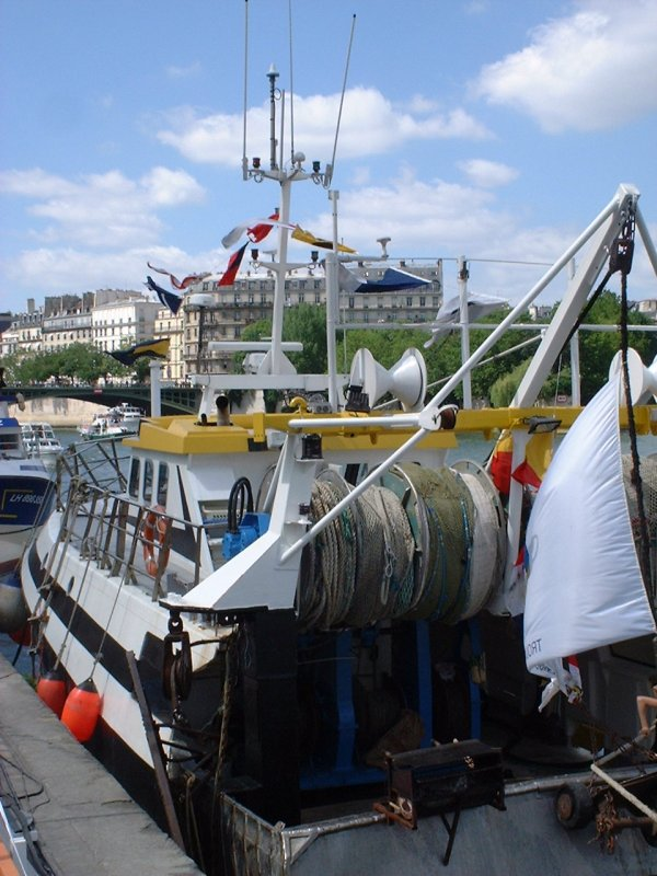 chalutier à quai, manifestation Paris Port de pêche 2004, quai Saint-Bernard, Paris